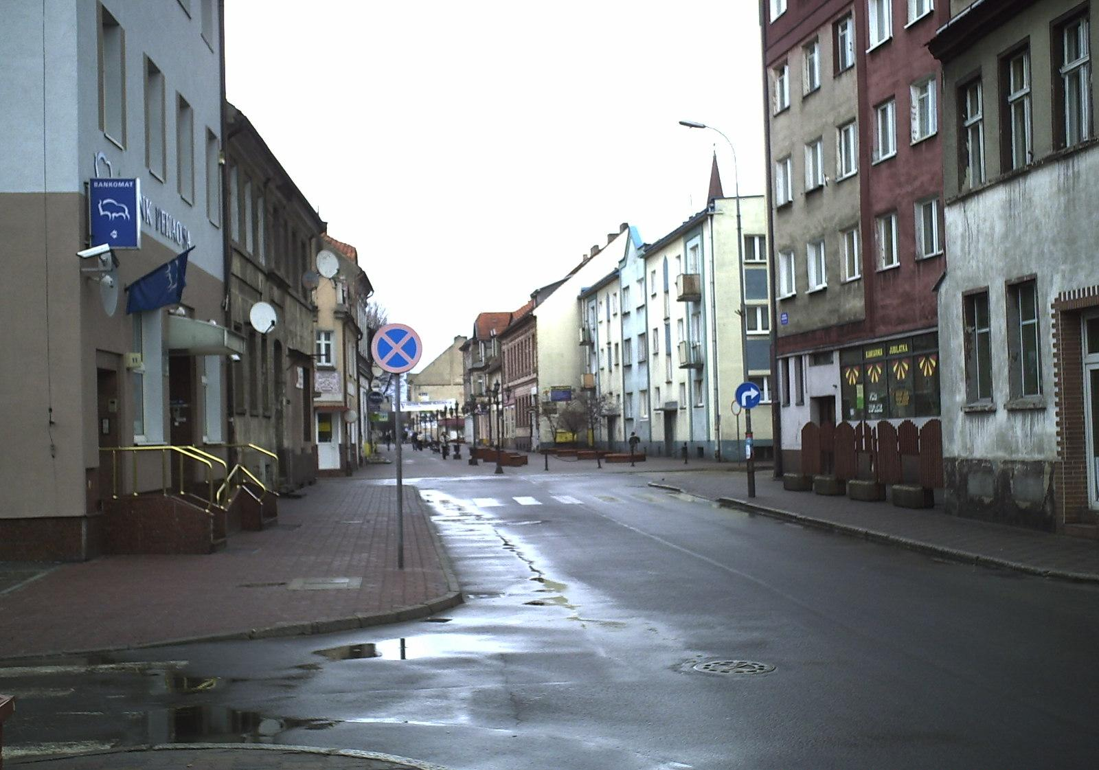 Pilsudskiego Street, Skwierzyna (lubuskie voivodship), Poland.